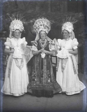 Garamszeghy Sándor: Matyólakodalom. Nemzeti Színház. Bemutató: 1934/12/31. Rendező: Rádai Dénes. Szereplők: Pupu Tera: Szörényi Éva, Kati: Somogyi Erzsi, Kisjankó Bori: Eőry Kató.